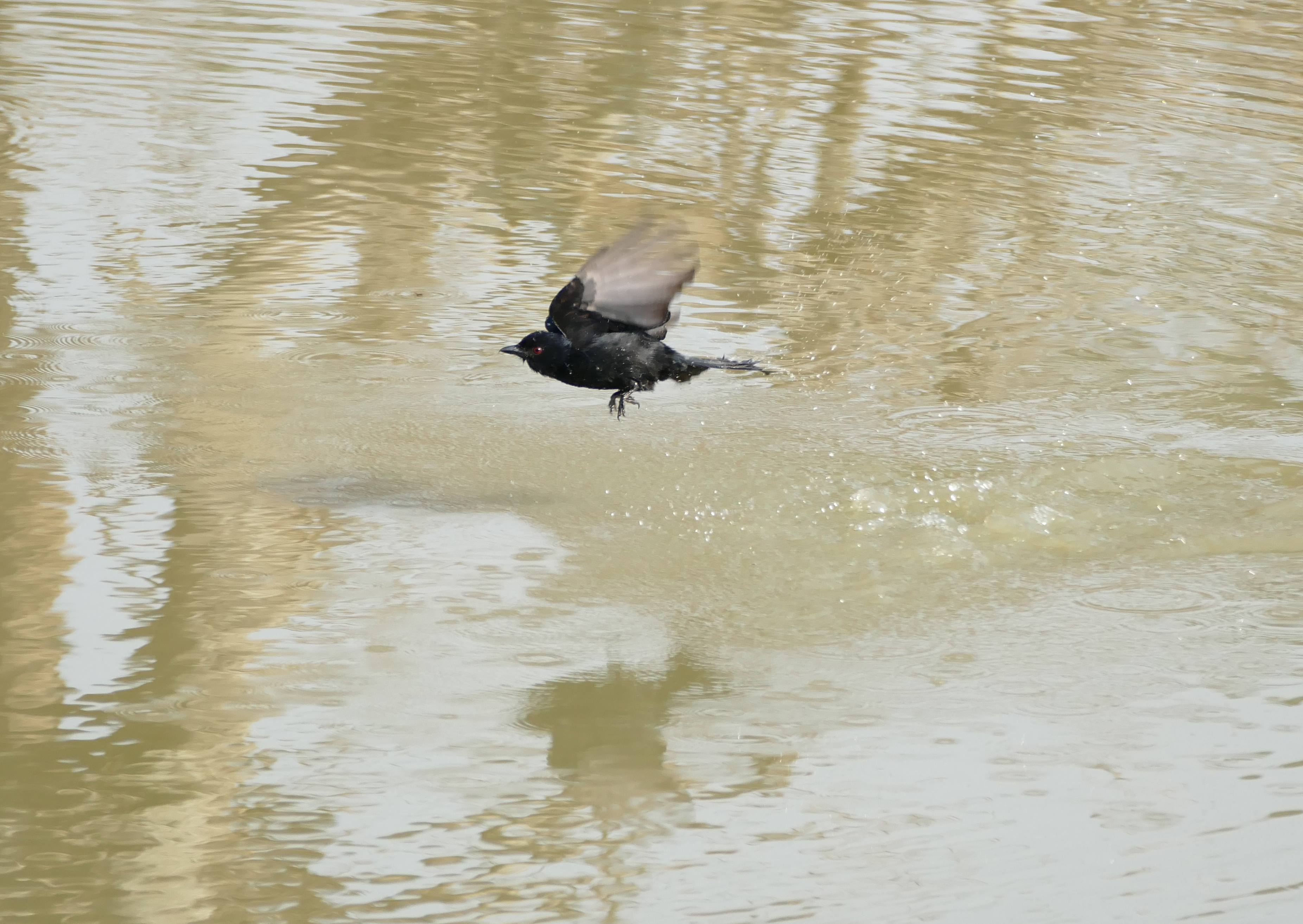 kuMasinga Hide, uMkhuze Game Reserve, Kwazulu-Natal, SOUTH AFRICA